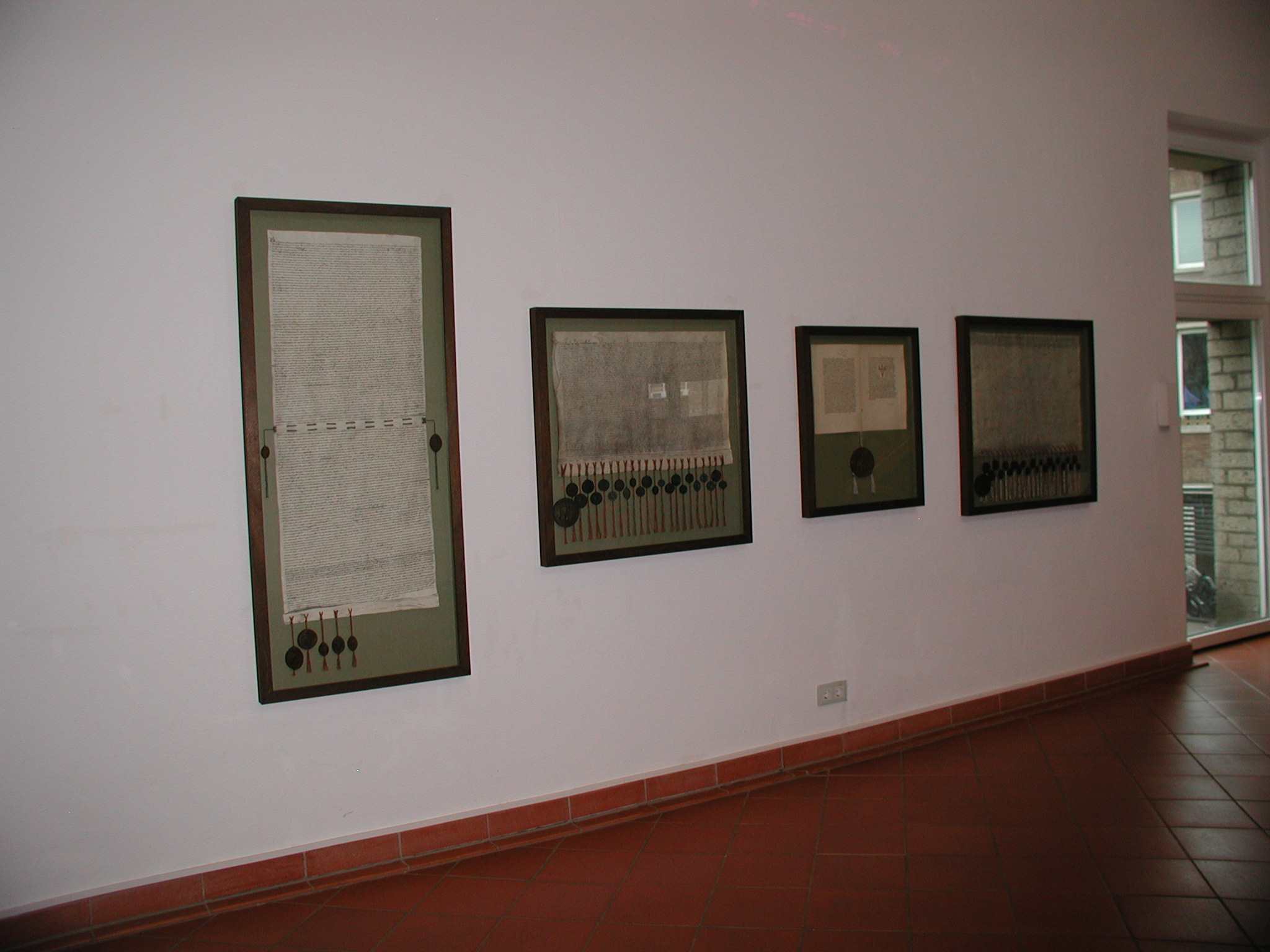 Köln-Rathaus, Verträge und Siegel